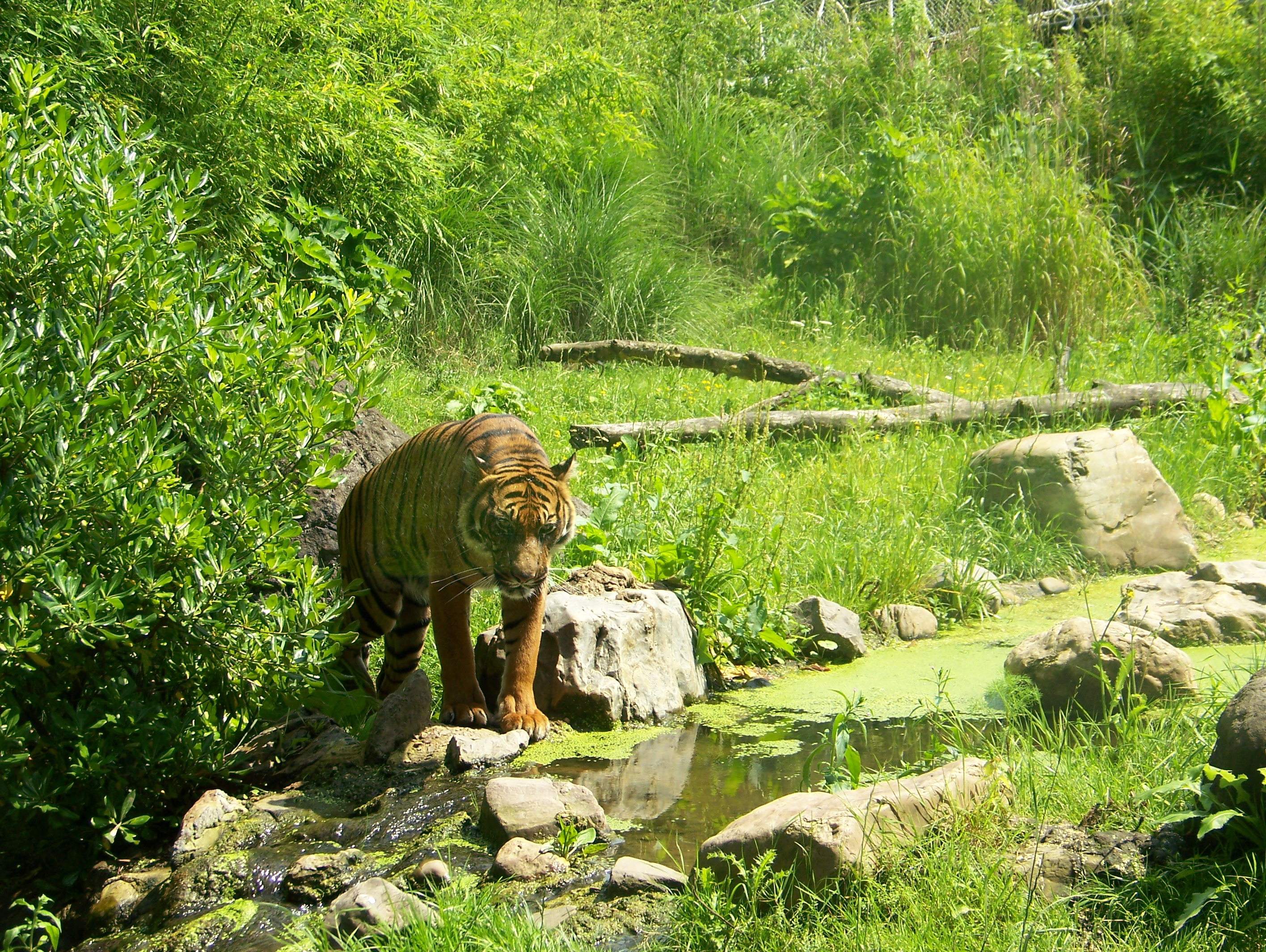 Panthera tigris sumatrae in Diergaarde Blijdorp